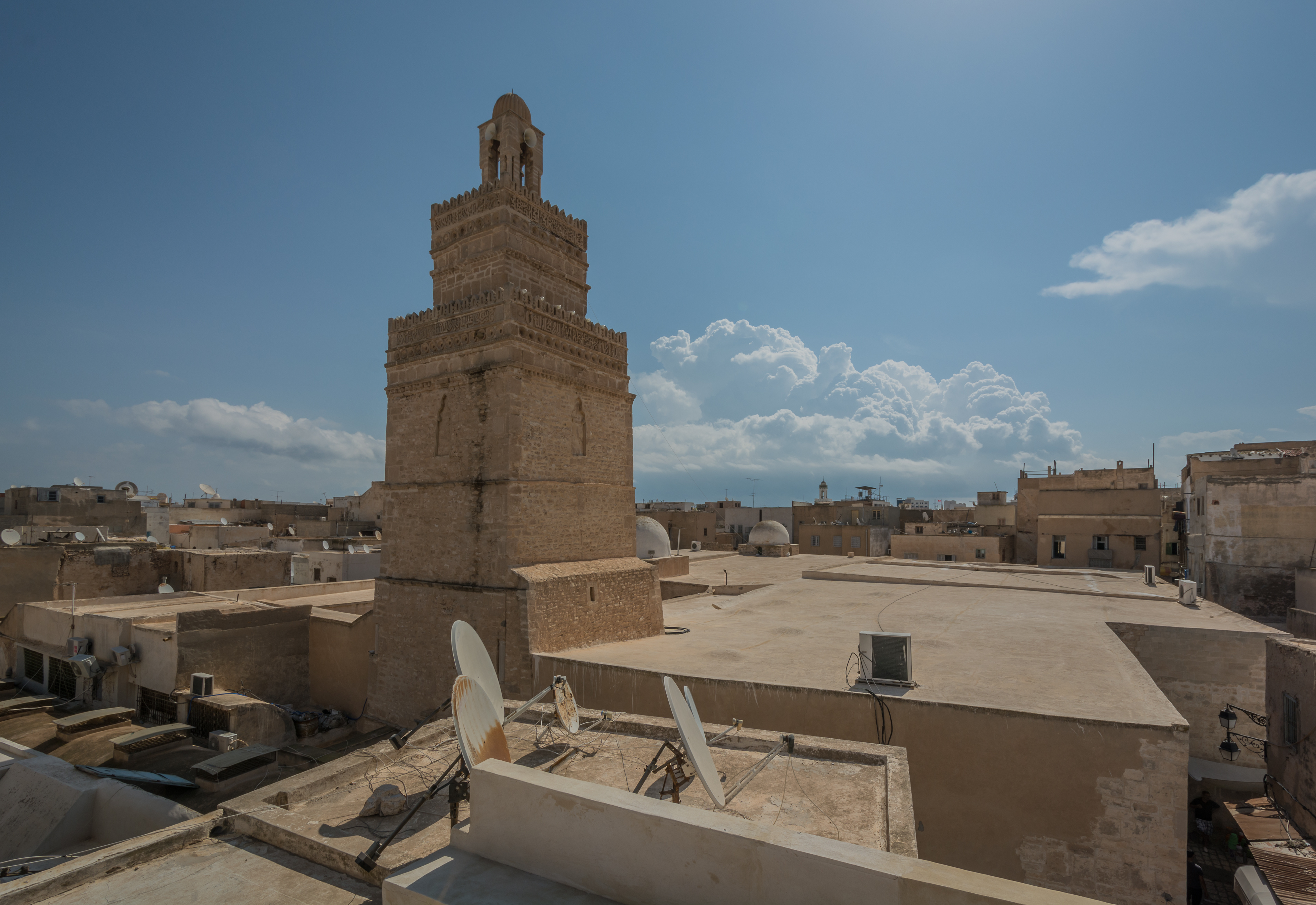 Grande mosquée